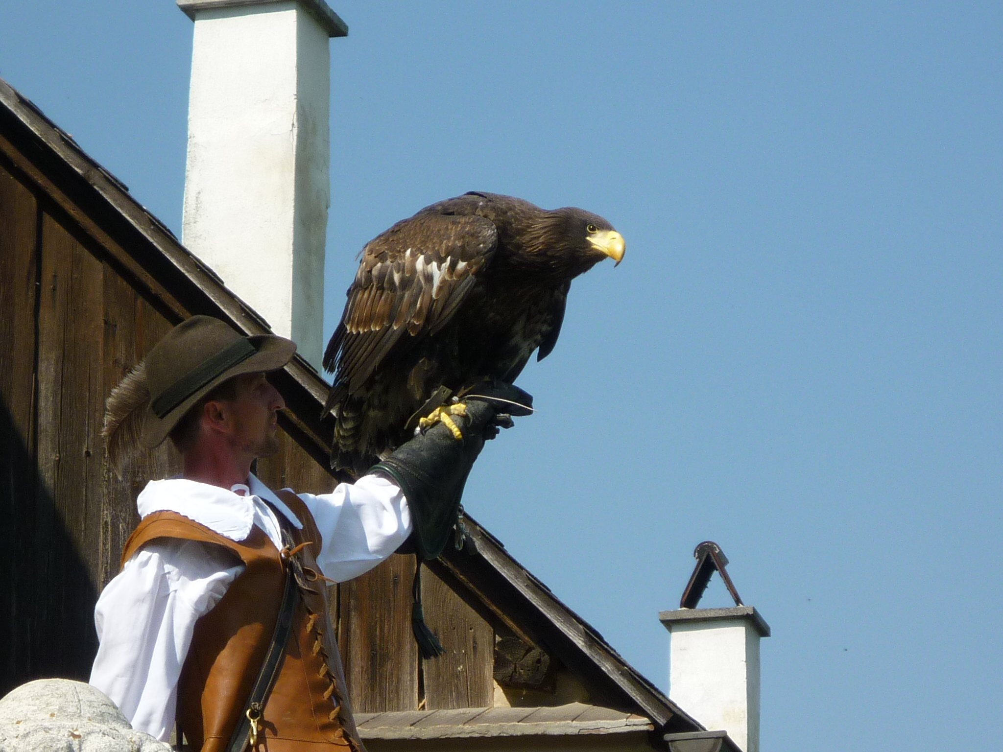 Greifvogelschau auf der Rosenburg, Gemeinde Rosenburg-Mold, Niederösterreich, Österreich